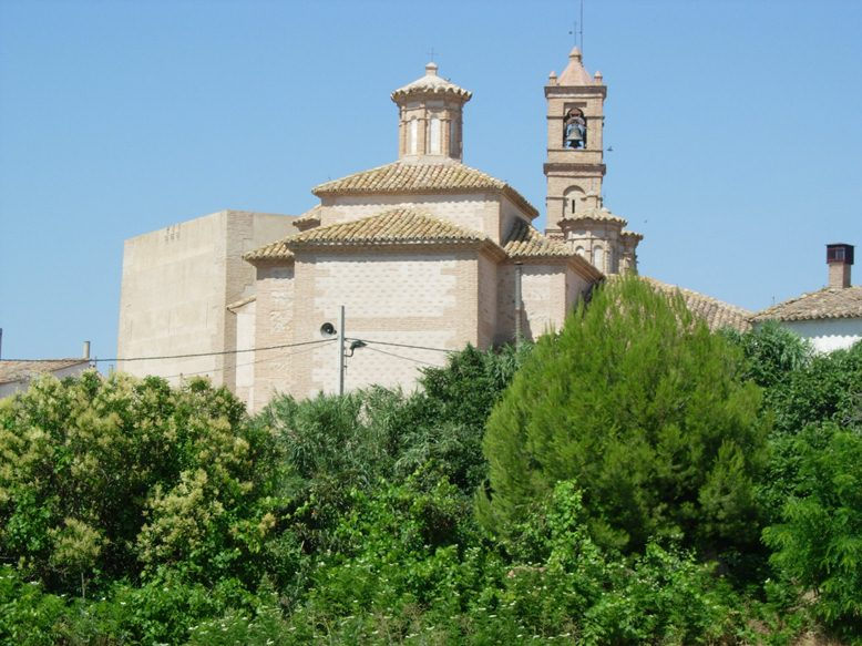 Parroquia de San Martín de Salillas de Jalón